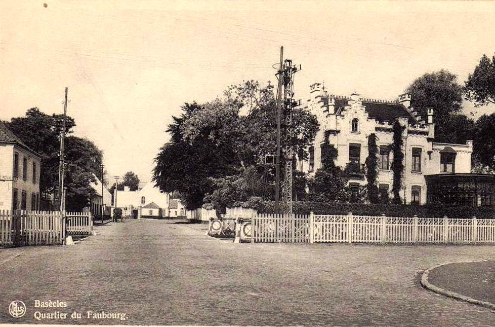 Gare de Basècles(dite gare de Basècles-Faubourg) PN de la RN Tournai-Mons